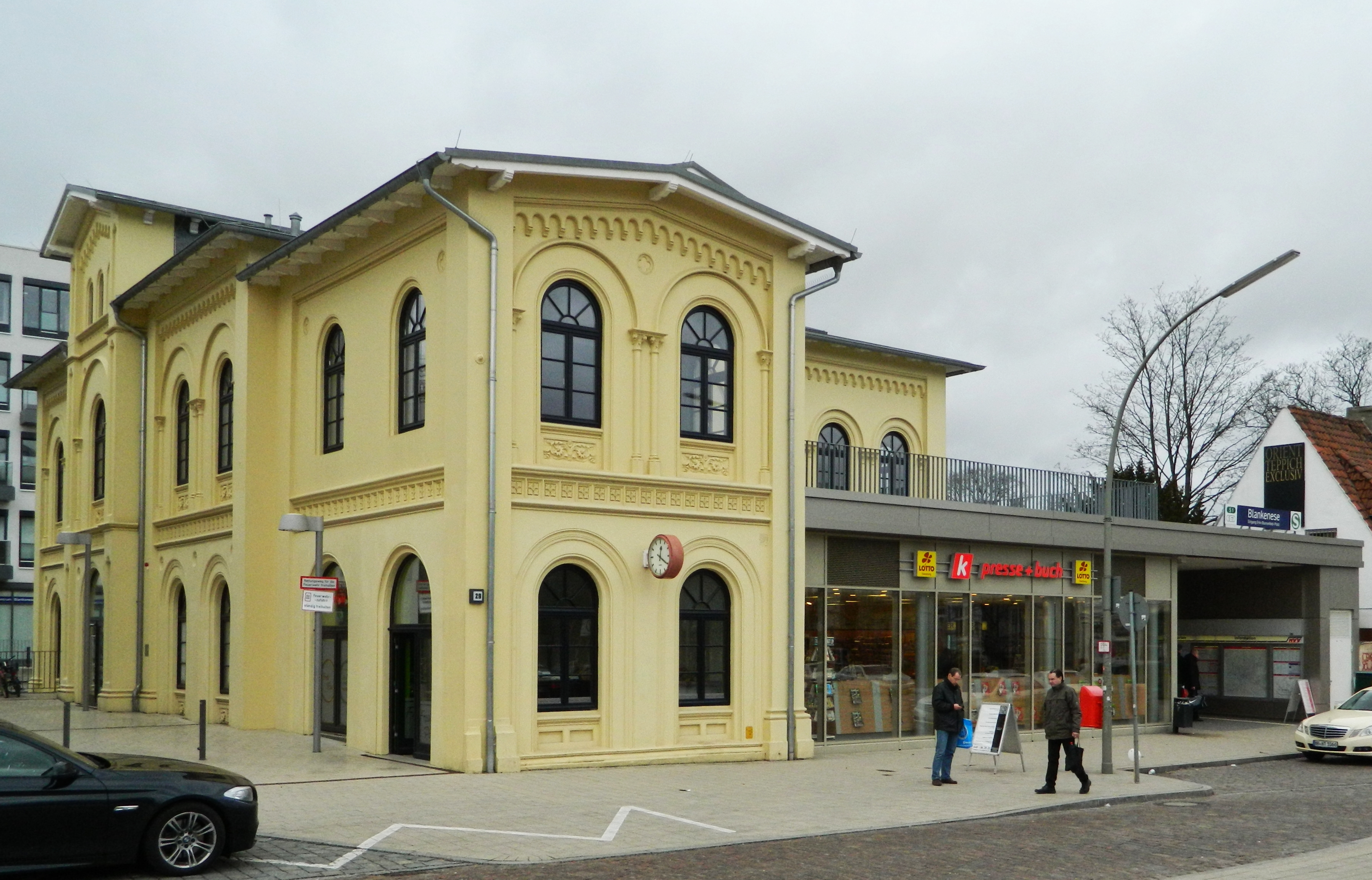 Bahnhof